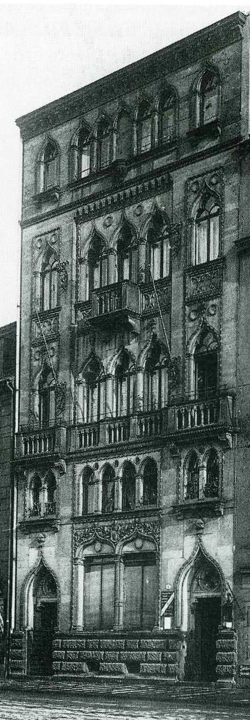 Venezianisches Haus, Terrassenufer 5 in Dresden, erbaut um 1880, zerstört 1945, Architekt unbekannt